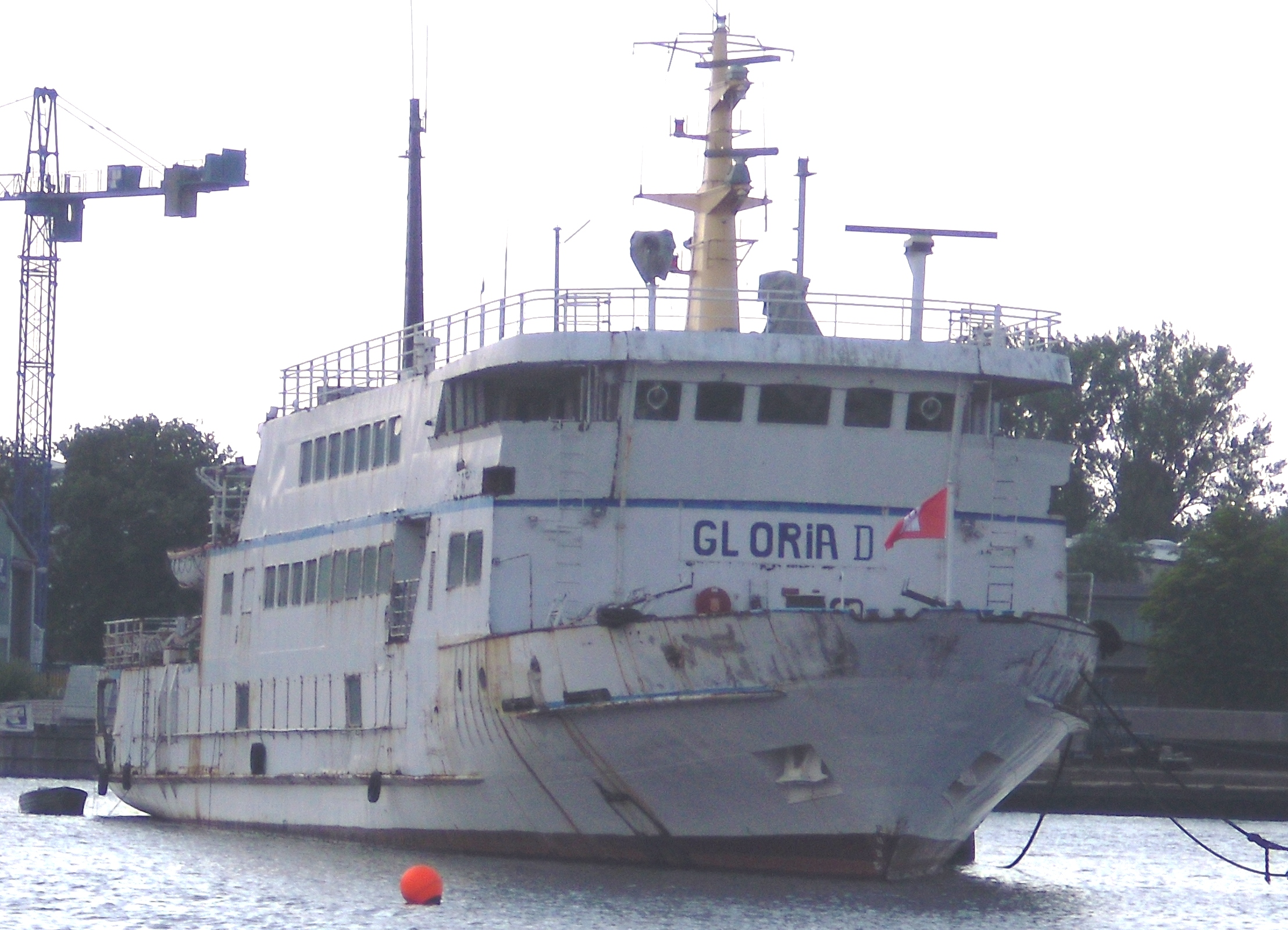 Gloria D. im Hargurger Binnenhafen.